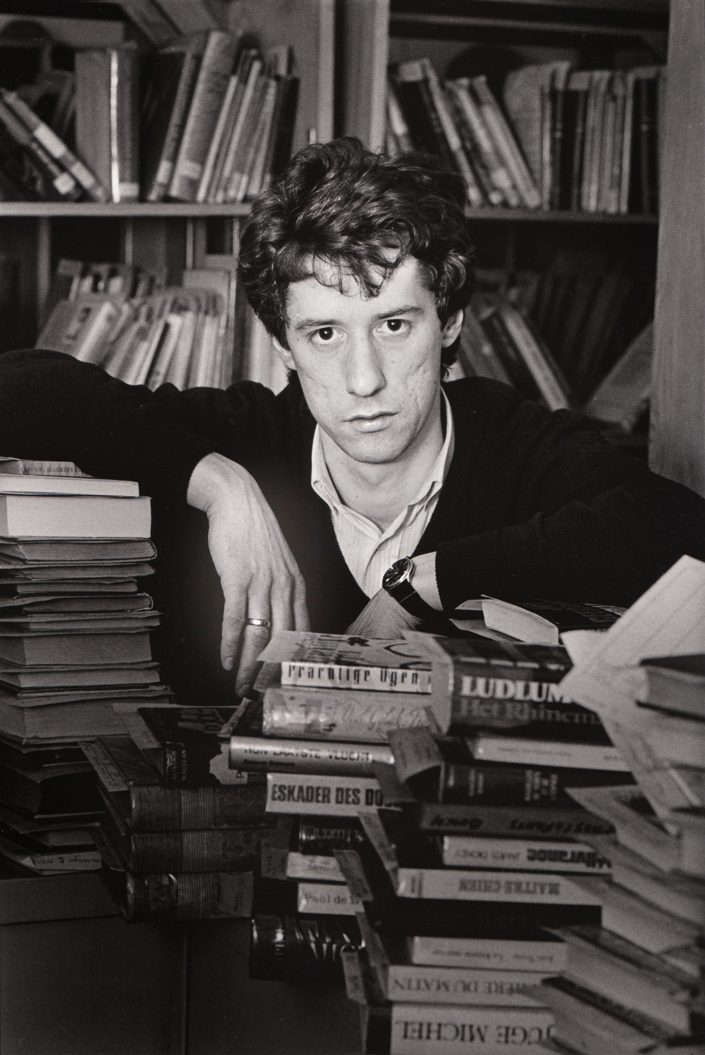 Schrijver Herman Brusselmans, 1985